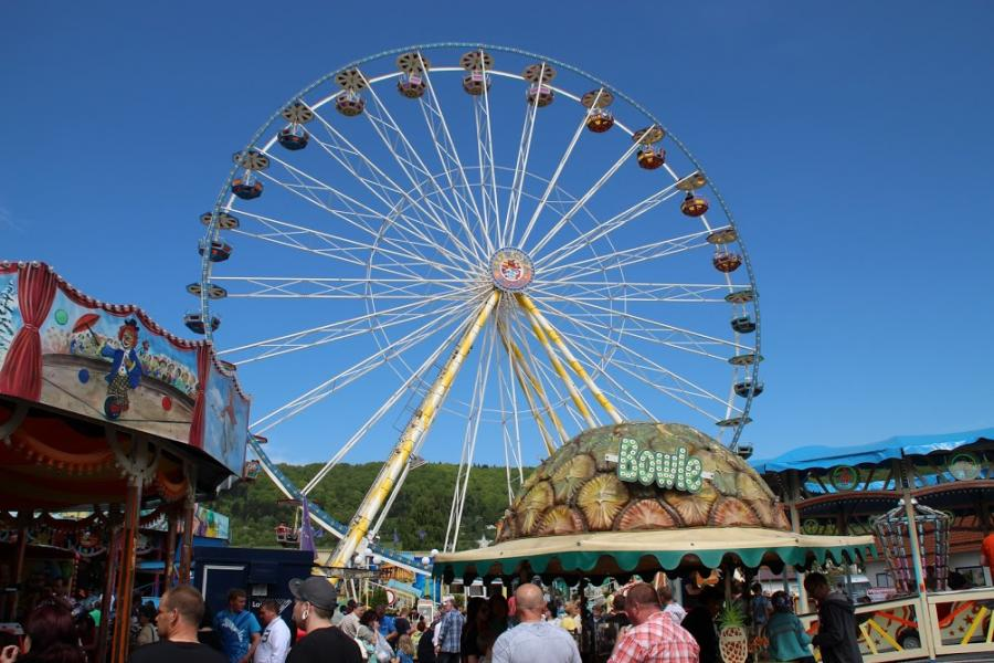 Das Bild zeigt den Festplatz "In der Aue" während des Heiratsmarktes in Kaltennordheim.